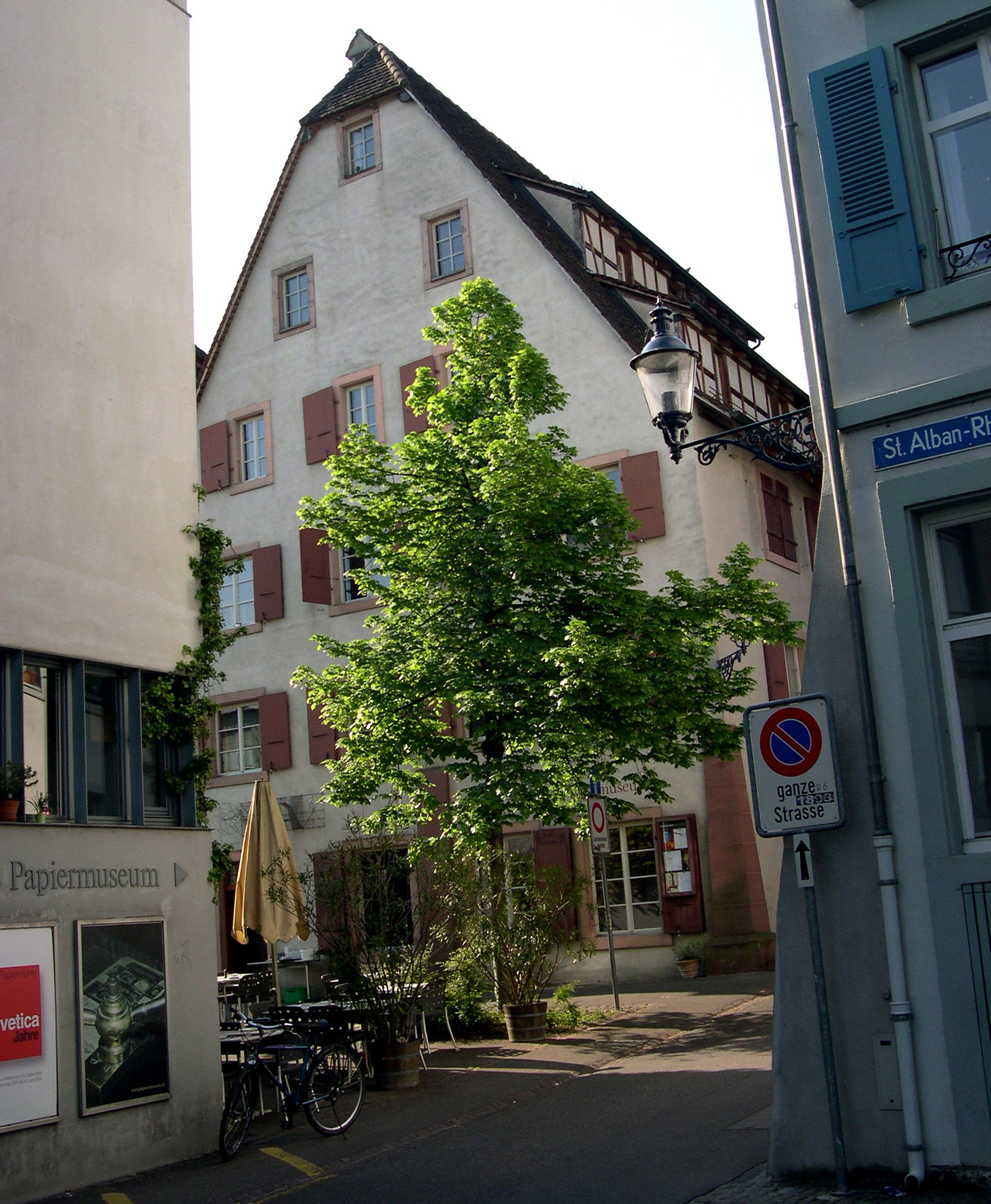 Schweizerisches Papiermuseum / Basler Papiermühle im St. Alban-Tal in Basel.